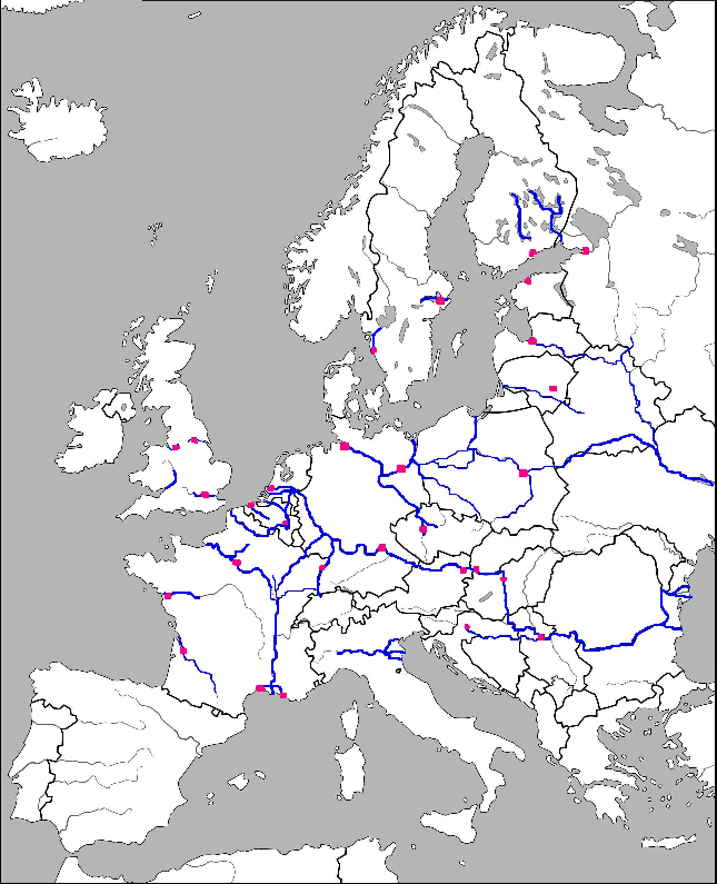 Inland navigation EU